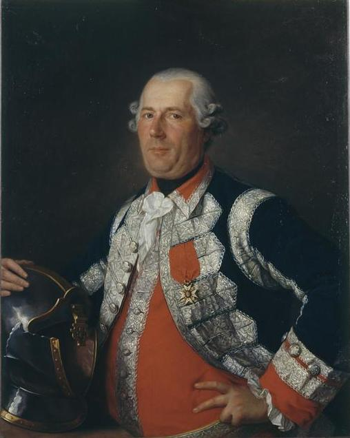 Monsieur Bergier, garde de la Manche, Première compagnie écossaise, gardes du corps de la Maison militaire du Roi